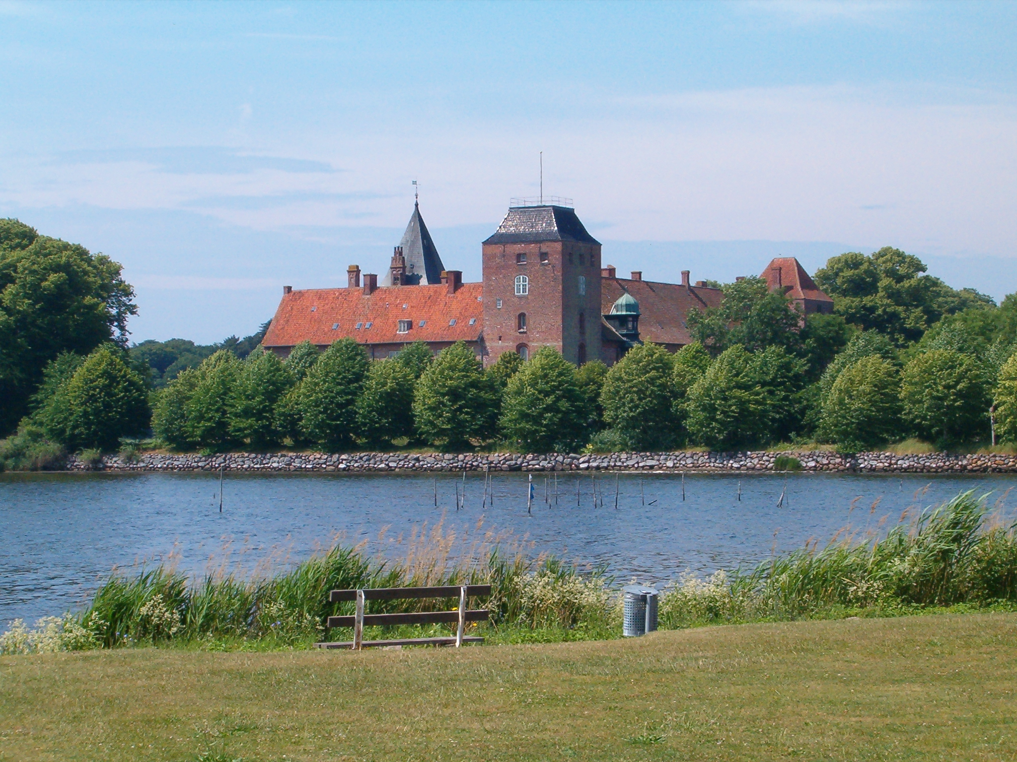 Ålholm slot set fra Nysted havn Aalholm castle from the harbour of Nysted Made by: Erik Damskier 21:32, 13 July 2006 (UTC) Author: Erik Damskier